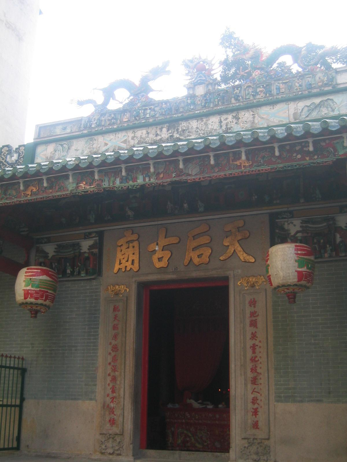 Tin Hau Temple, Causeway Bay, Hong Kong